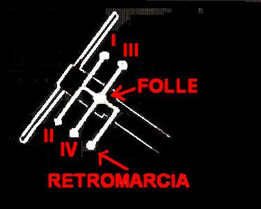 Immagine (disegno) eseguito autonomamente dal sottoscritto (Giomayo) con il programma "Paint" di Windows ispirandosi e traendo le necessarie informazioni dalla rivista Quattroruote numero 8/1956 (pagina 9)